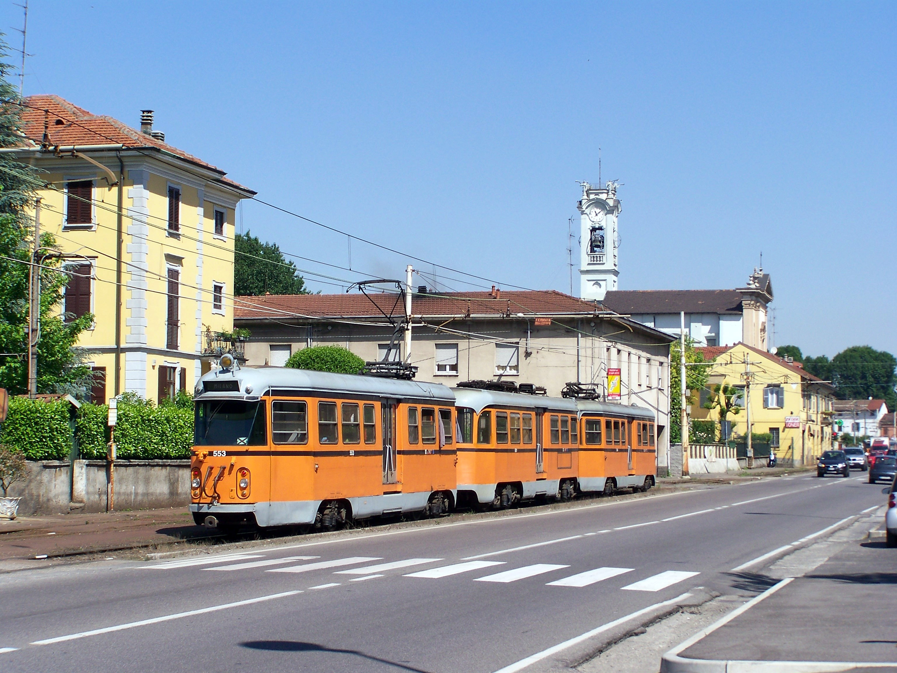 Il Bloccato 553+501+554 diretto a Limbiate in sosta presso il raddoppio di Cassina Amata in attesa di incrociare il convoglio diretto a Milano.